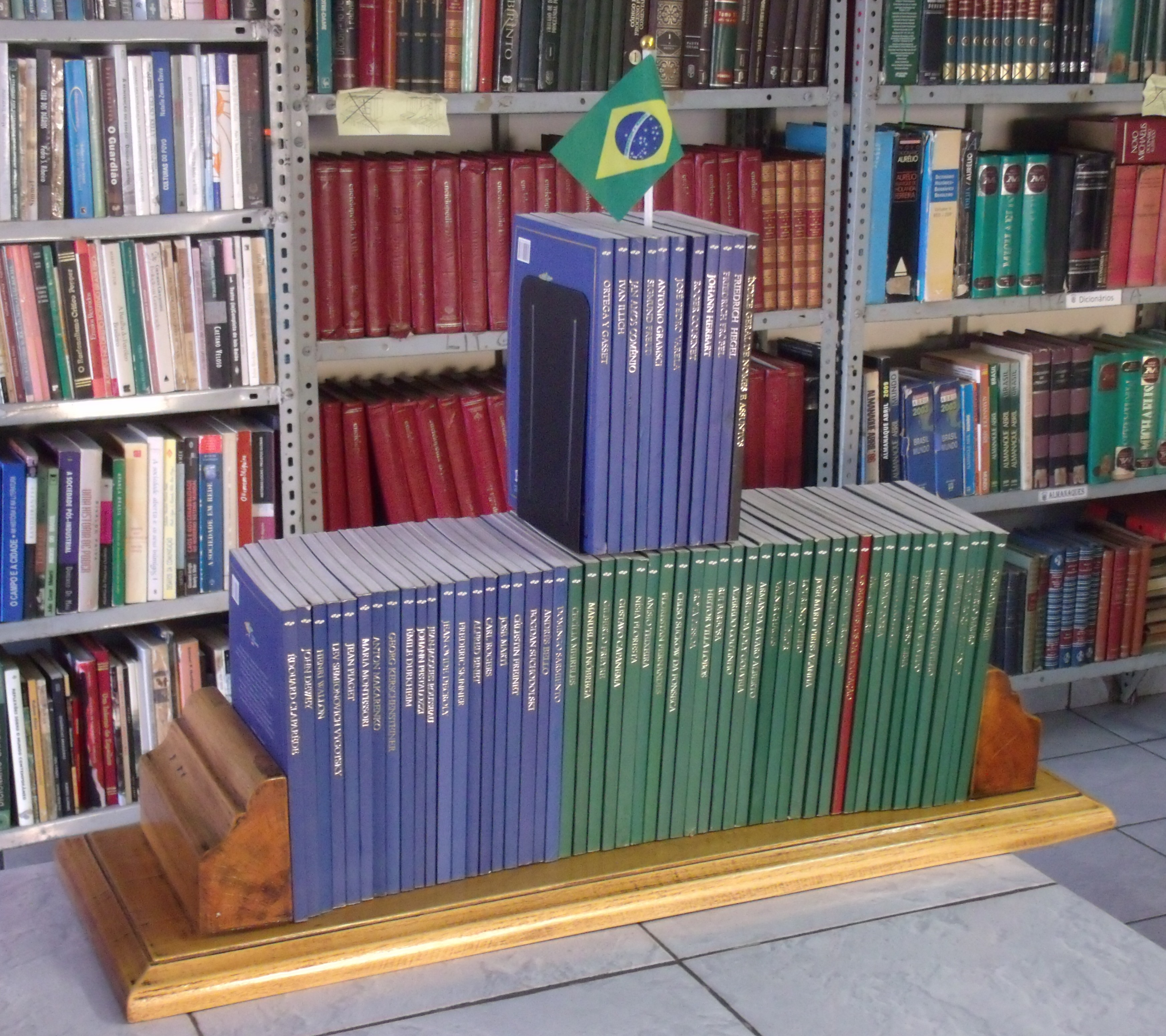 Interior de uma Biblioteca Pública Municipal expondo a Coleção Educadores do Ministério da educação do Brasil.